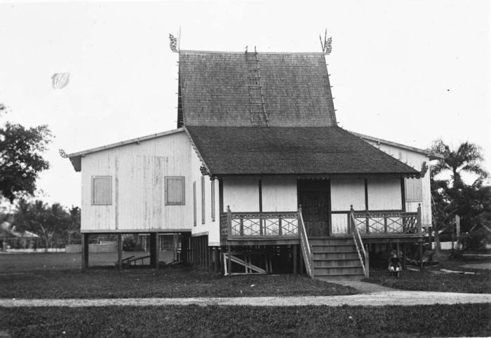 Foto. Borneo museum in Bandjermasin